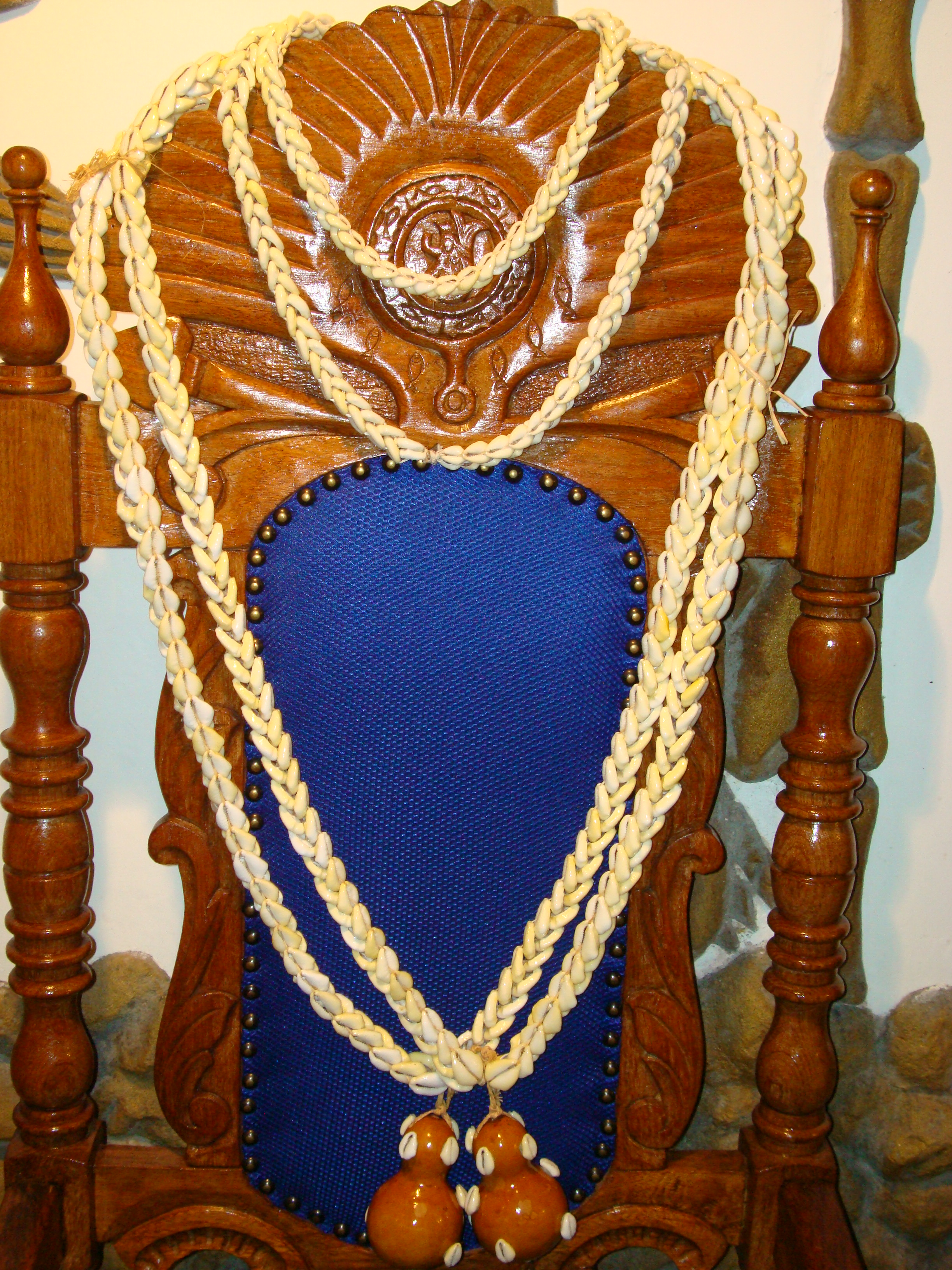 Brajá, fio de conta do candomblé